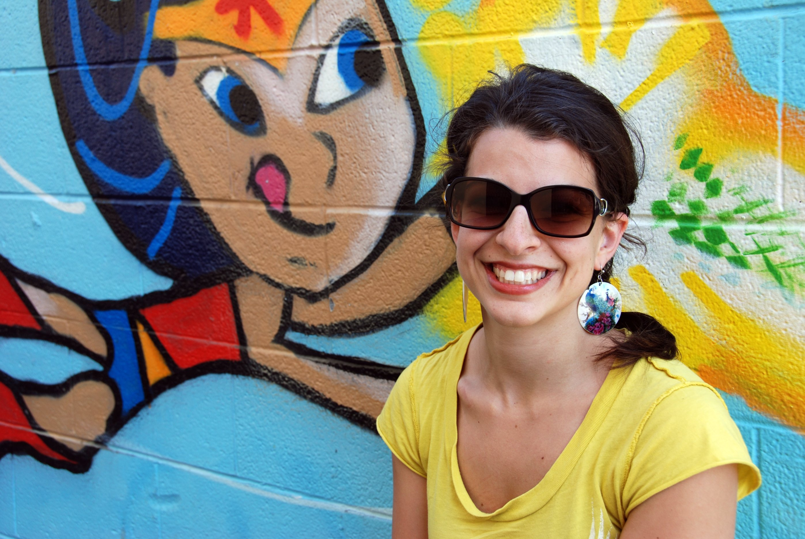 Anita Sarkeesian smiling